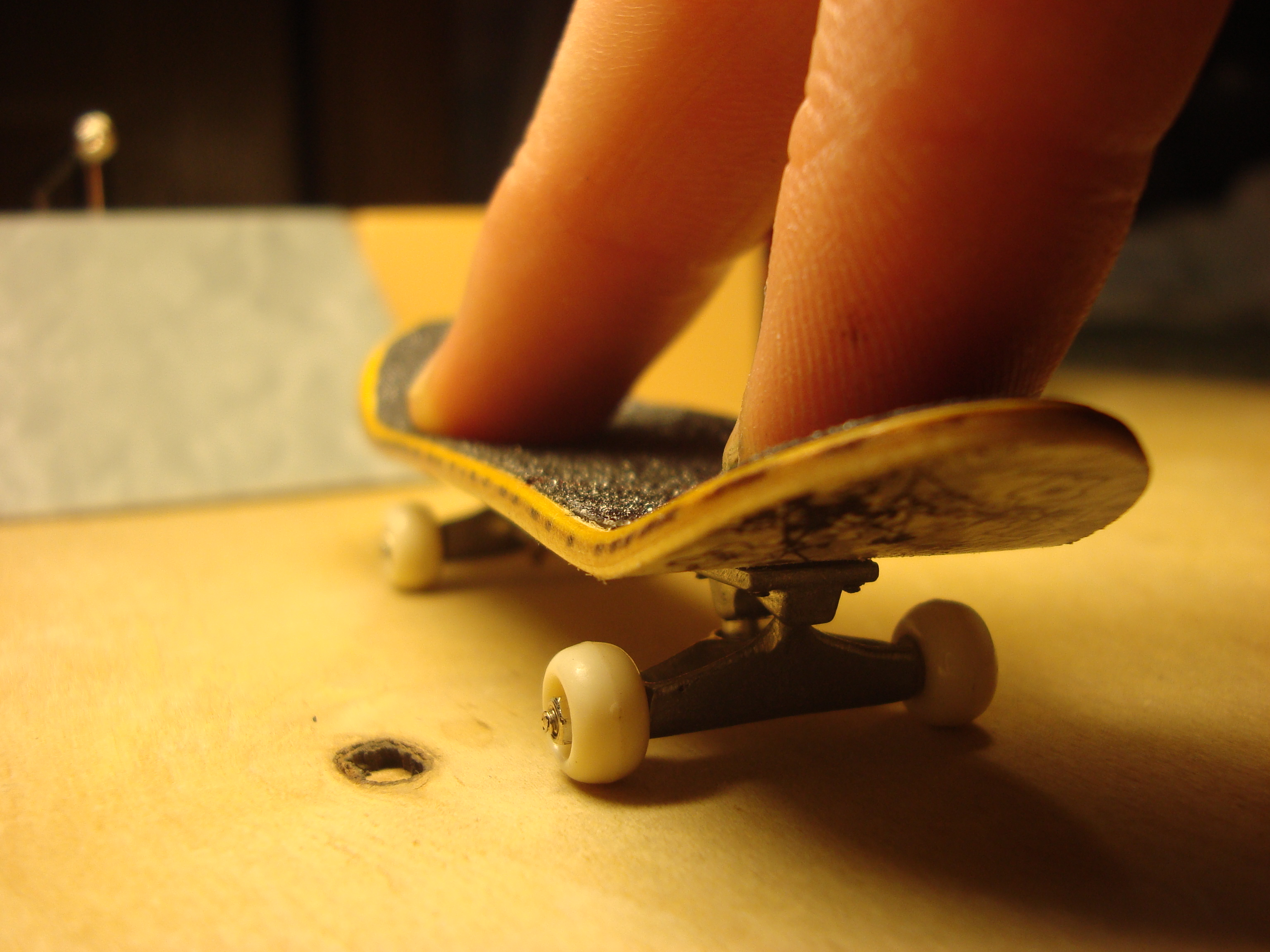 Деревянный Фингерборд "Турбо"